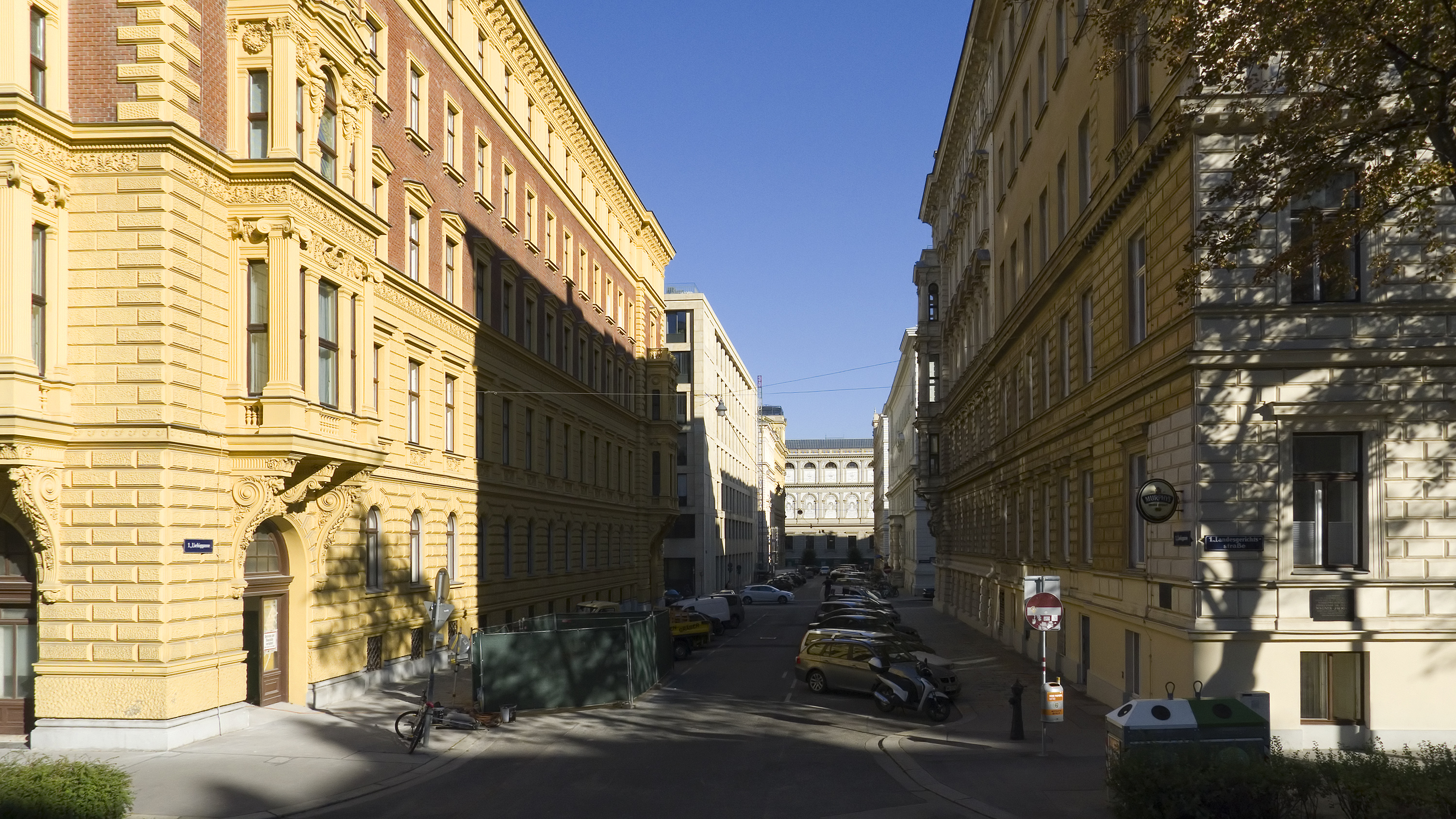 Liebiggasse in Wien 1 bei Nr. 1 Richtung Osten